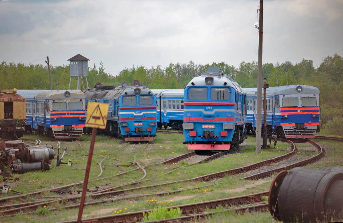 Дизель-поезда ДДБ1 на базе запаса Крулевщизна